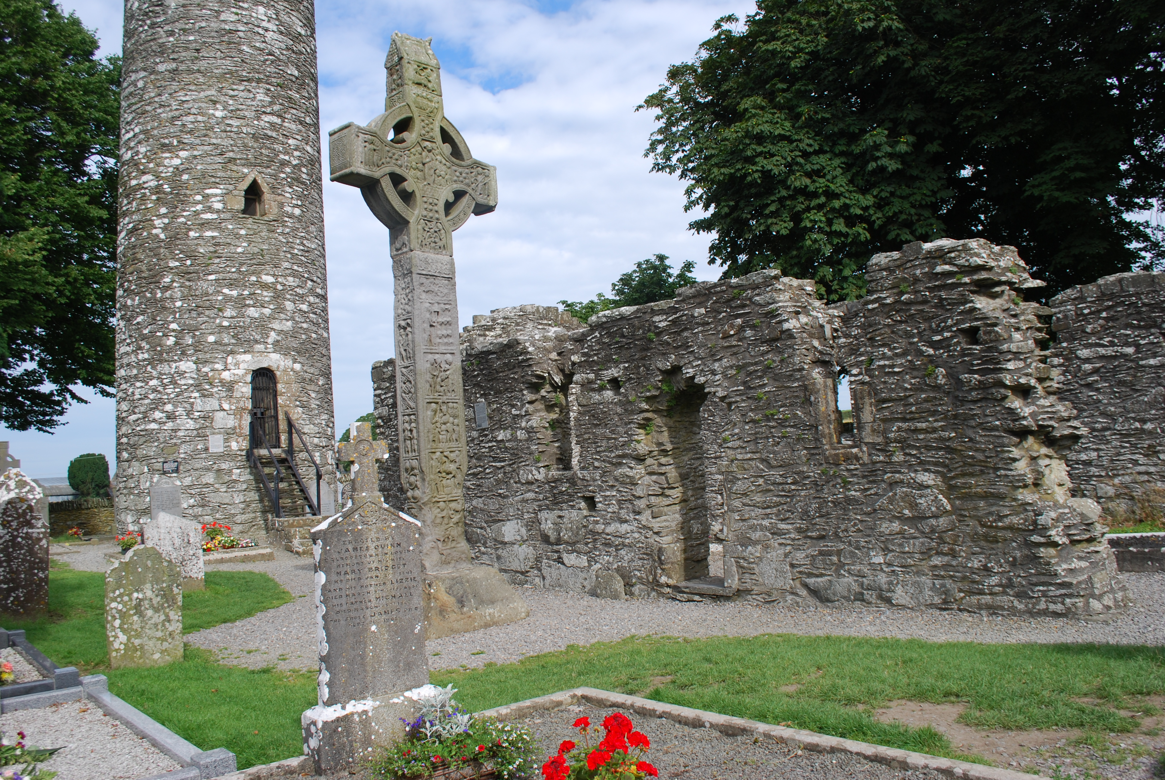 Vue du cimetière de l'ancienne abbaye de Monasterboyce, en Irlande.